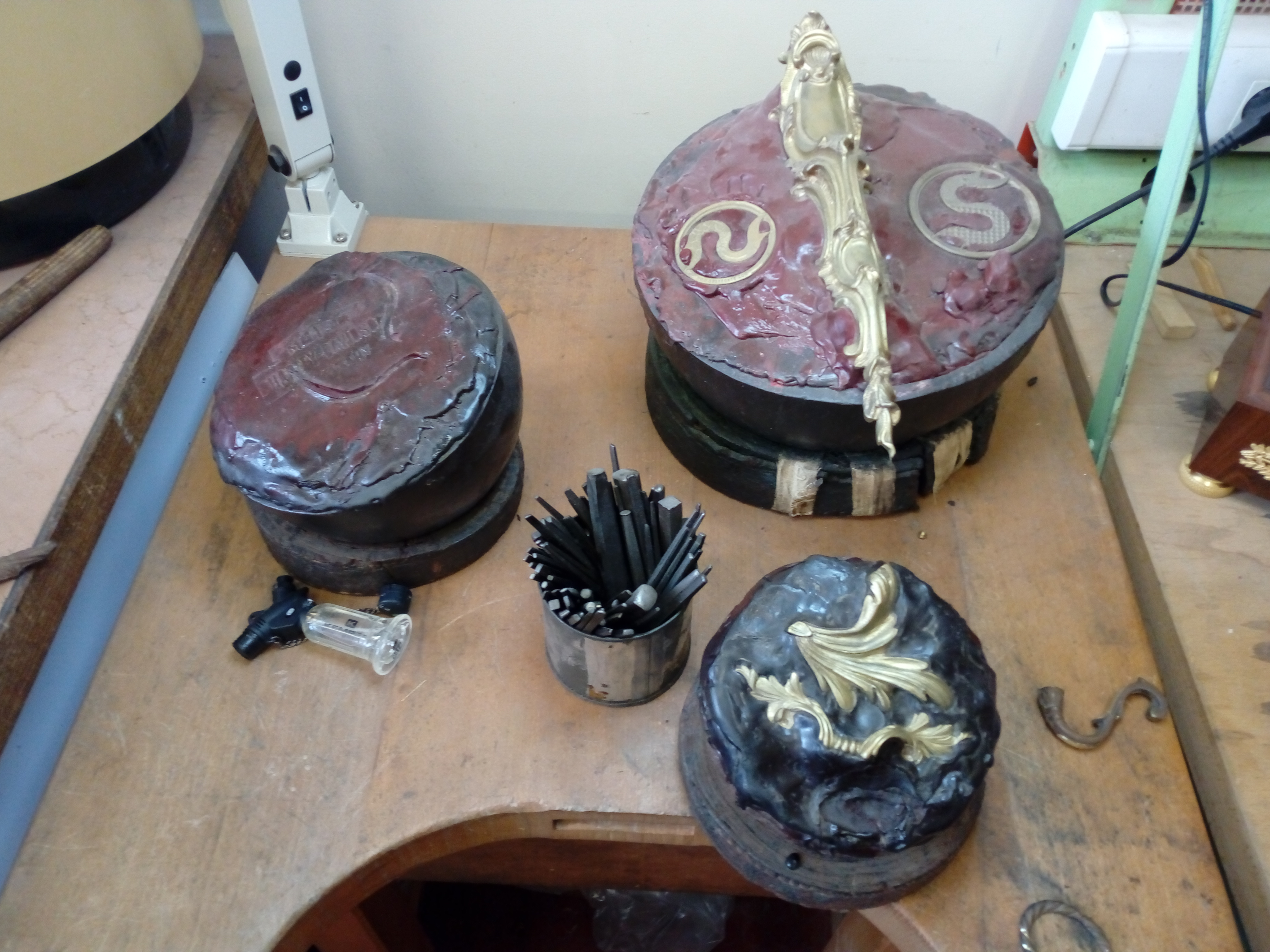 Boulets de ciseleur, utilisés pour fixer les objets en bronze à ciseler